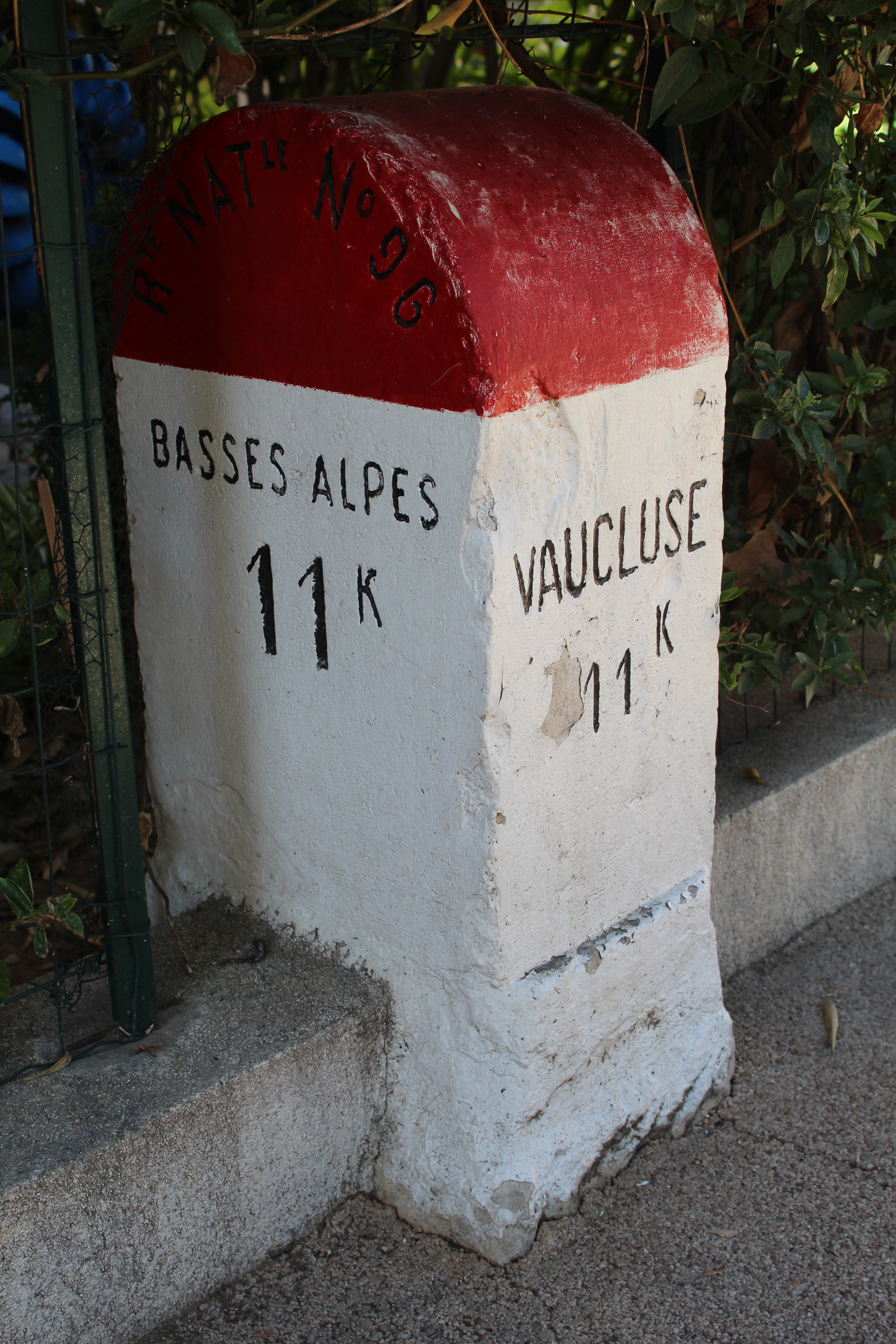 Borne kilométrique de l'ancienne route nationale 96 à Manosque.